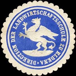 Sealing stamp Title: Direction der Landwirtschaftsschule zu Eldena Description: blau, weiß, geprägt Place: Eldena size: 4 cm